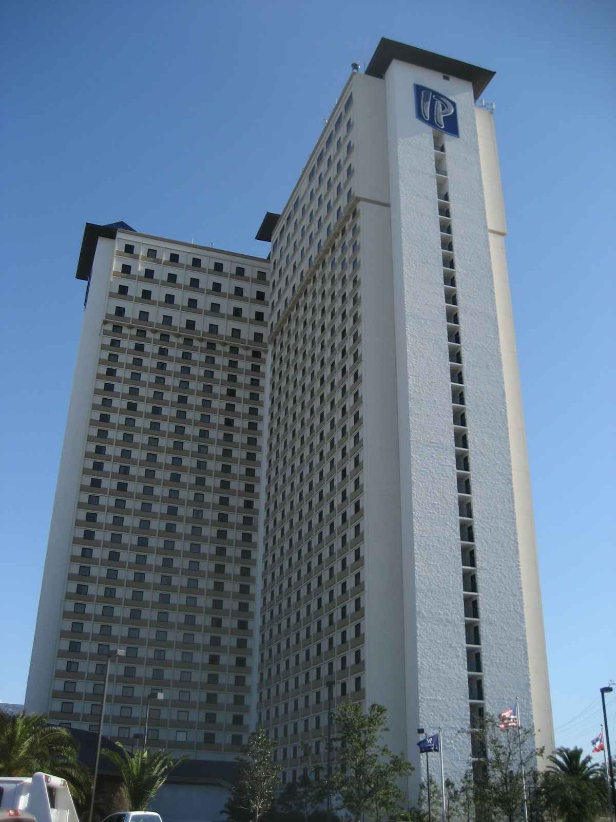 IP Hotel and Casino in Biloxi, Mississippi.